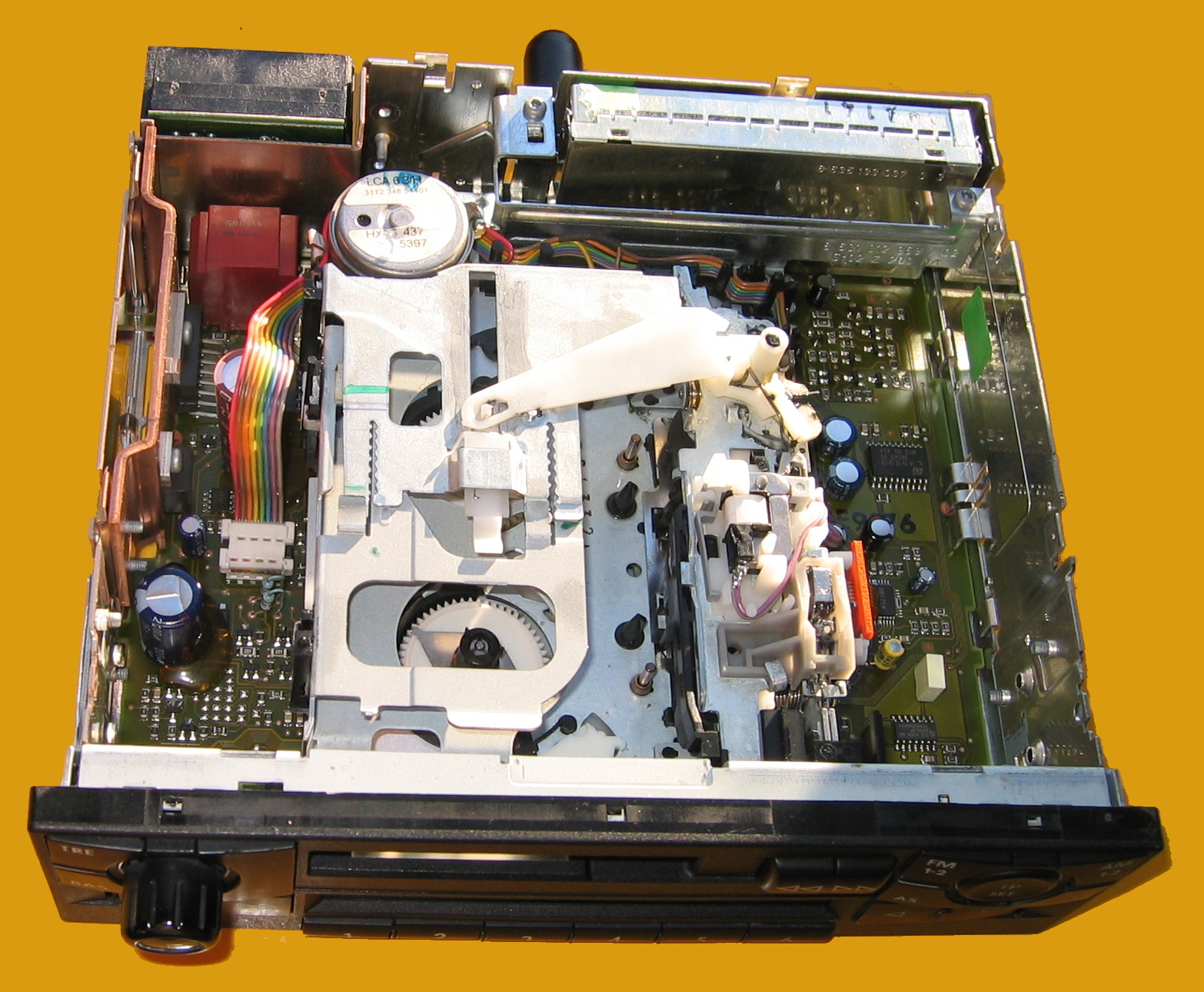 Geöffnetes Radio mit eingelegter Cassette im Laufwerk